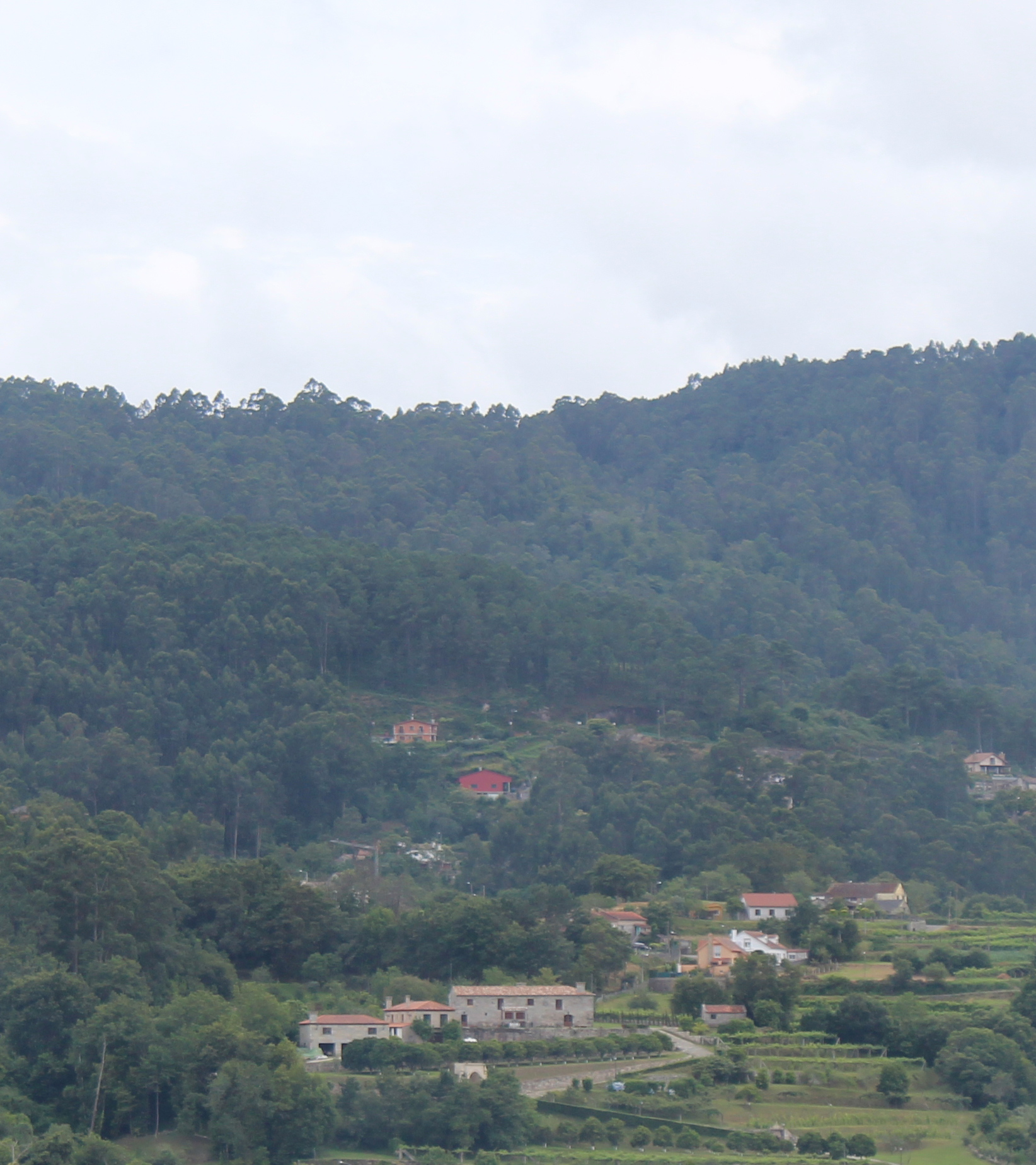 Couto de Moldes; Mañufe, Gondomar